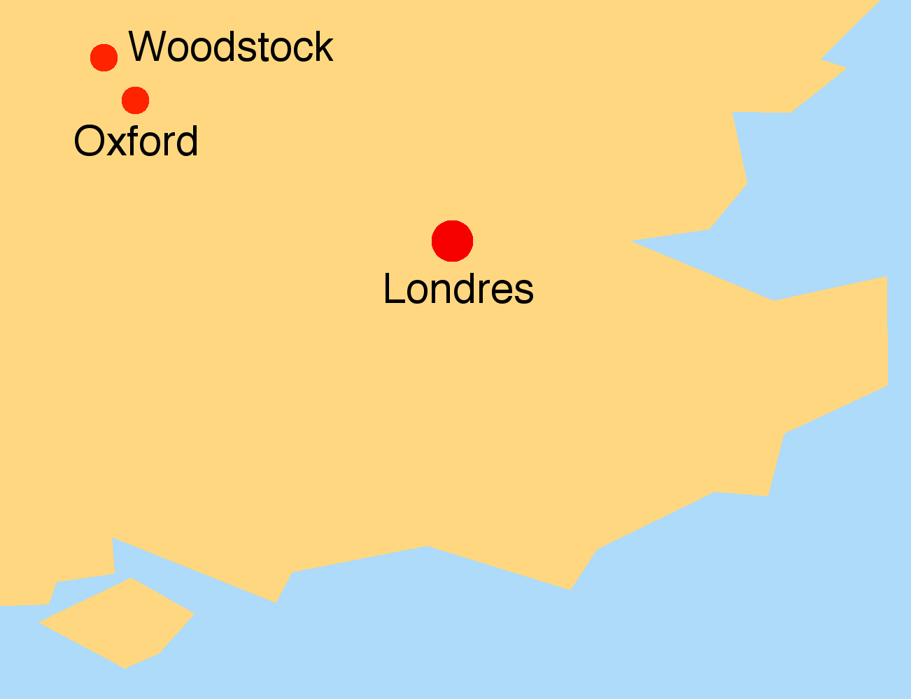 Situation approximative de Woodstock par rapport à Oxford et à Londres pour le roman Woodstock de Walter Scott. Tracé des côtes schématisé d'après EnglandAdminCountiesNumbered.png de Cruccone, 2005.